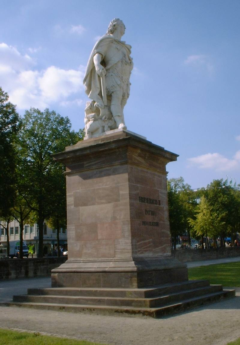 Beschreibung: Denkmal des Landgrafen Friedrich II. von Hessen-Kassel auf dem Friedrichsplatz in Kassel Quelle: selbst fotografiert Fotograf/Zeichner: Doris Antony, Berlin Datum der Aufnahme: 21.09.2005 14:32, 30. Sep 2005 DorisAntony 800 x 1150 (88473 Byte) (* Beschreibung: Denkmal Friedrichs II. auf dem Friedrichsplatz in Kassel * Quelle: selbst fotografiert * Fotograf/Zeichner: Doris Antony, Berlin * Datum der Aufnahme: 21.09.2005 * Lizenzstatus: GFDL )